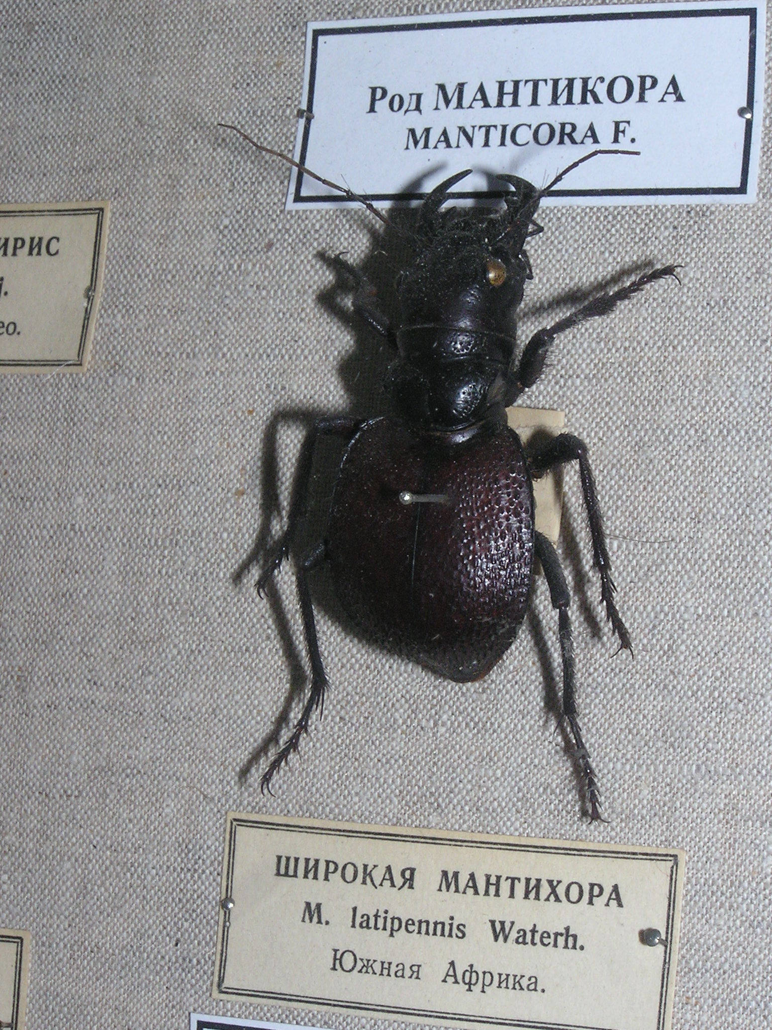 Manticora latipennis